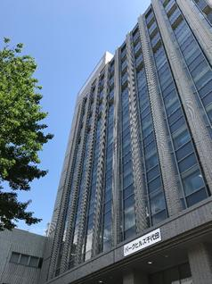 日本ゼネラルフードの概観写真